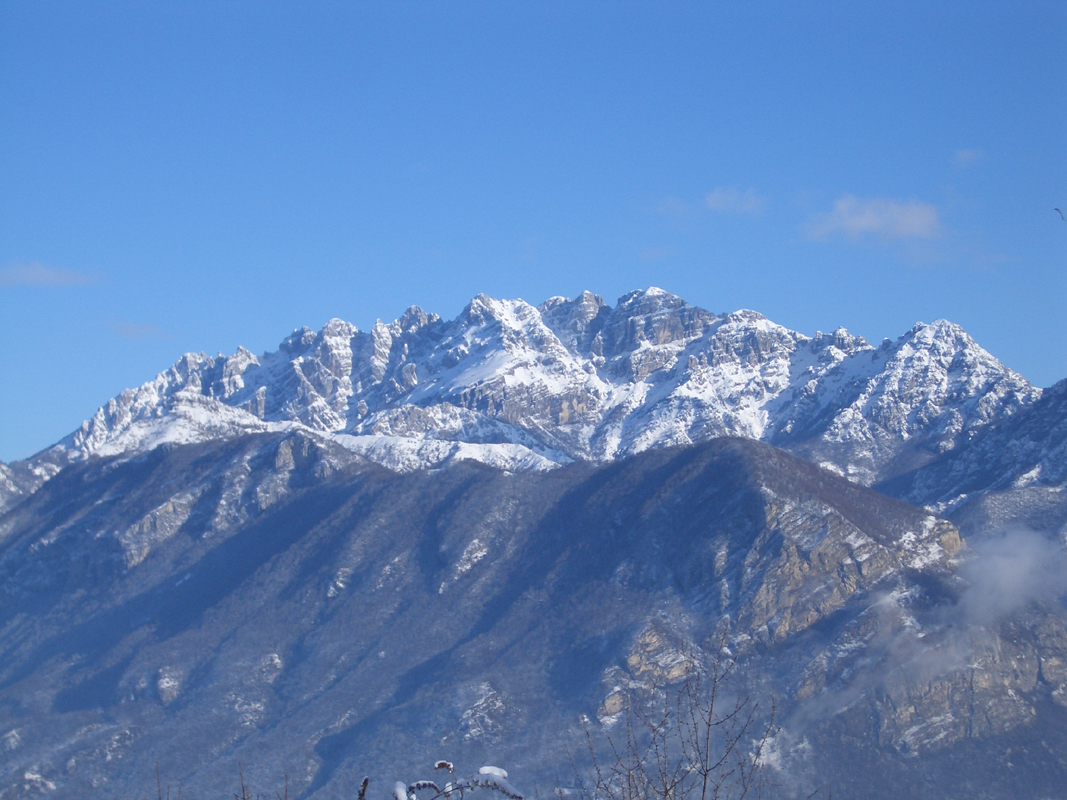 Il Resegone visto da Consonno (versante opposto della vallata). Foto scattata il 26 dicembre 2008.